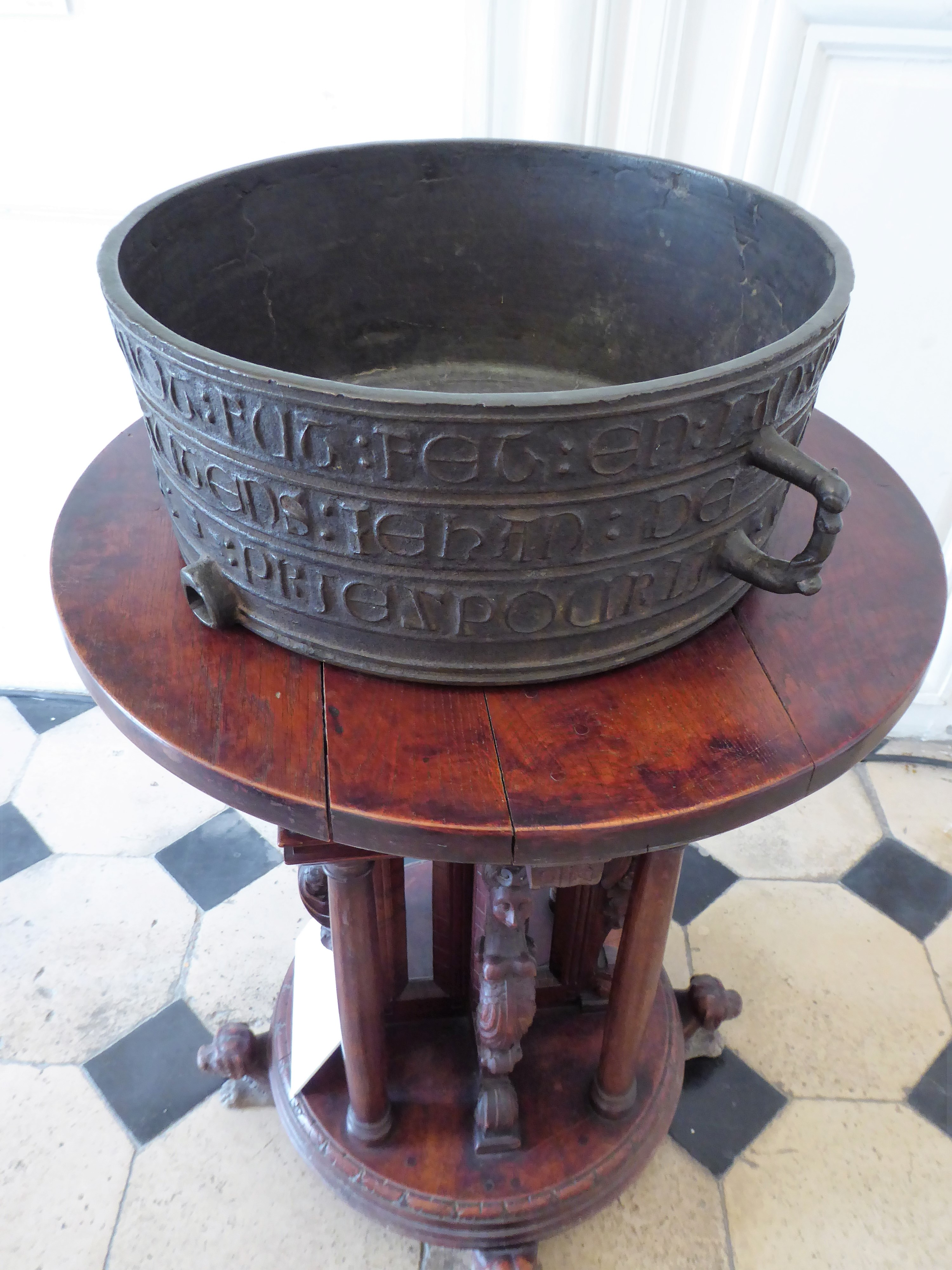 cette mesure à grains est un minot de Chartres du XIIIe siècle en bronze, exposé au musée des beaux-arts de Chartres, Eure-et-Loir, France. Inscription : "Ce minot fut fait en l'an 1223 du mois de novembre au temps de Jean de Chevreuse, bailli d'Orléans. Guillaume le Saint me fit, priez pour lui."